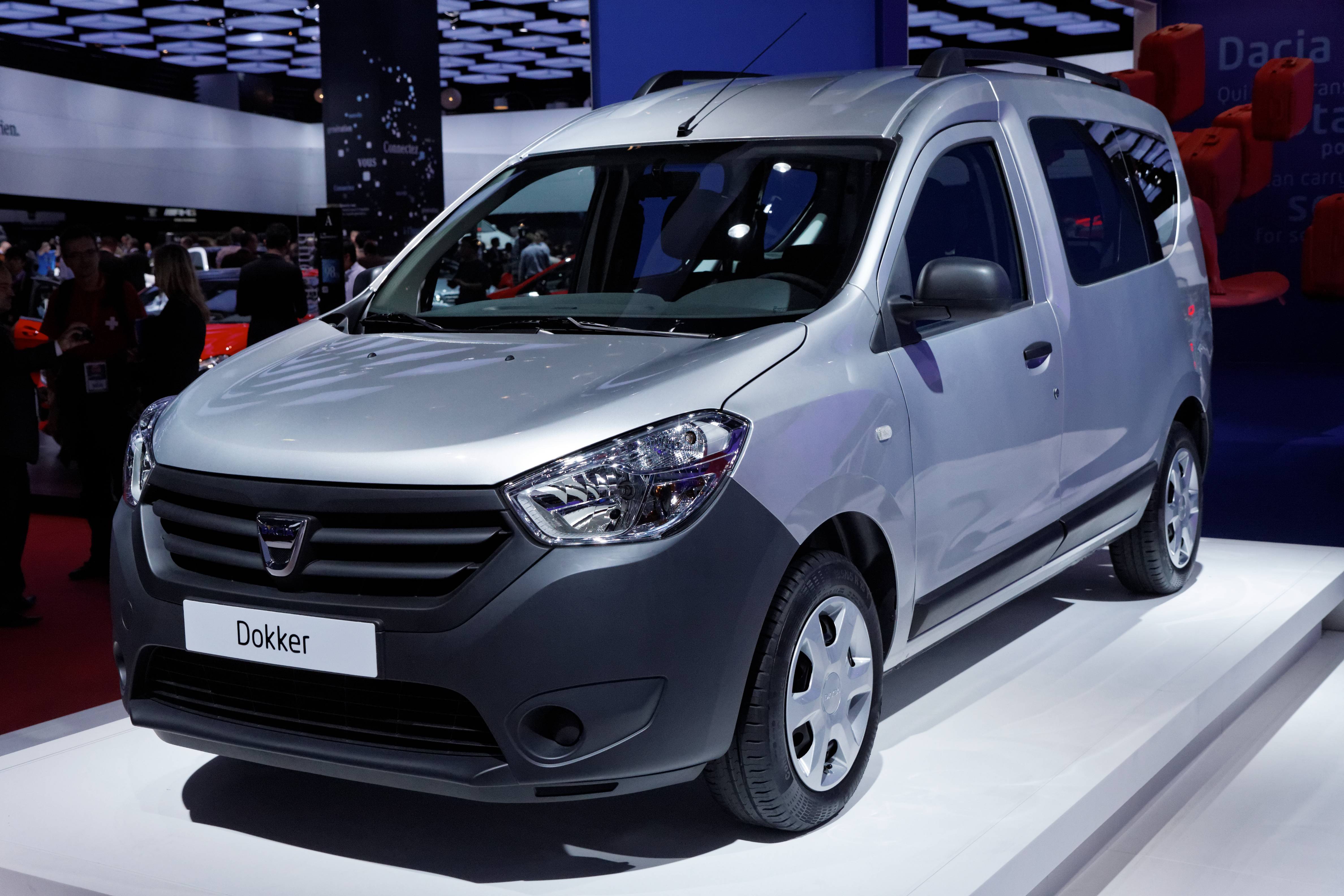 Une Dacia Dokker présentée lors du Mondial de l'automobile de Paris 2012.